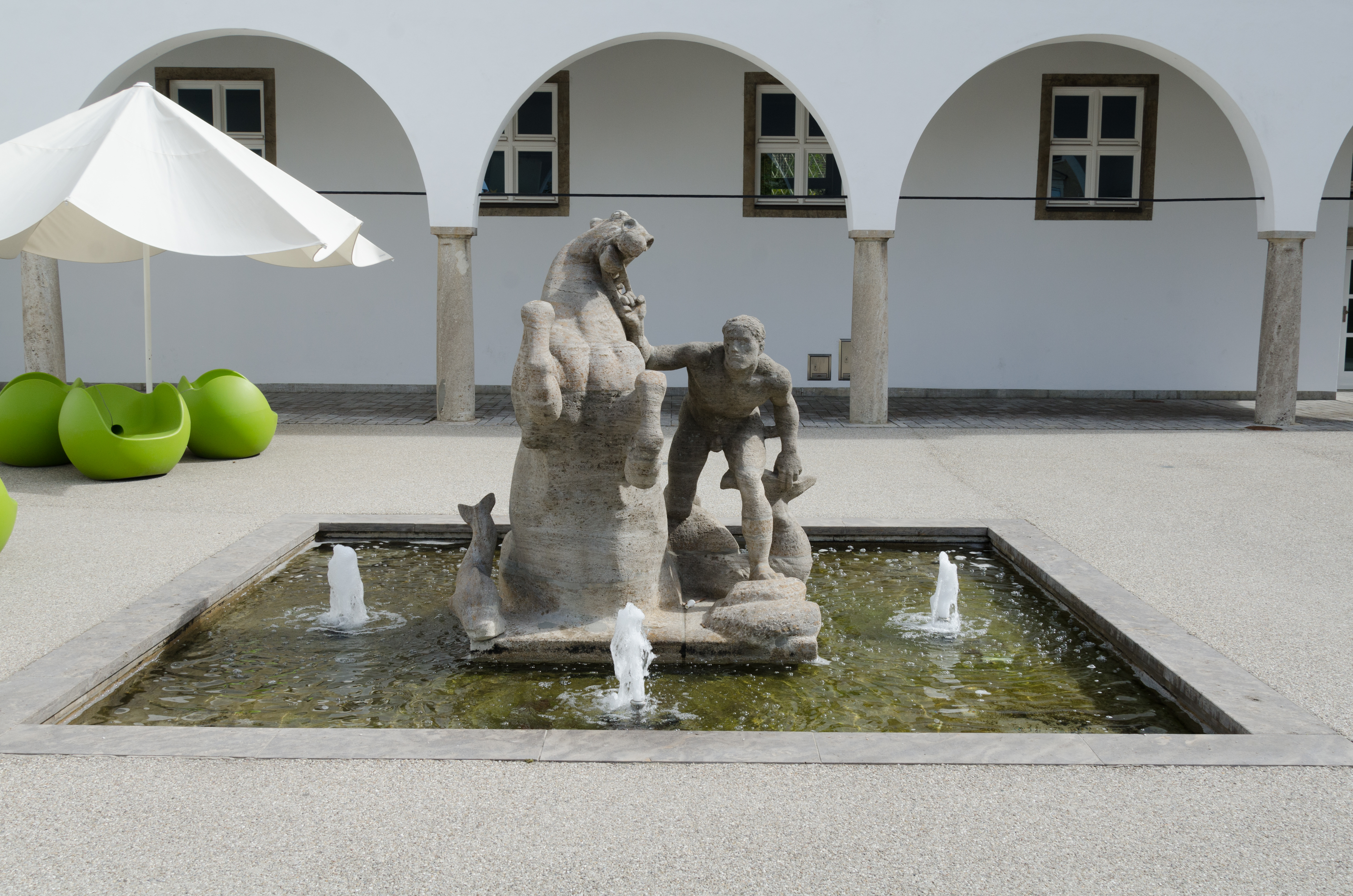 Schweinfurt, Rüfferstraße, Brunnen